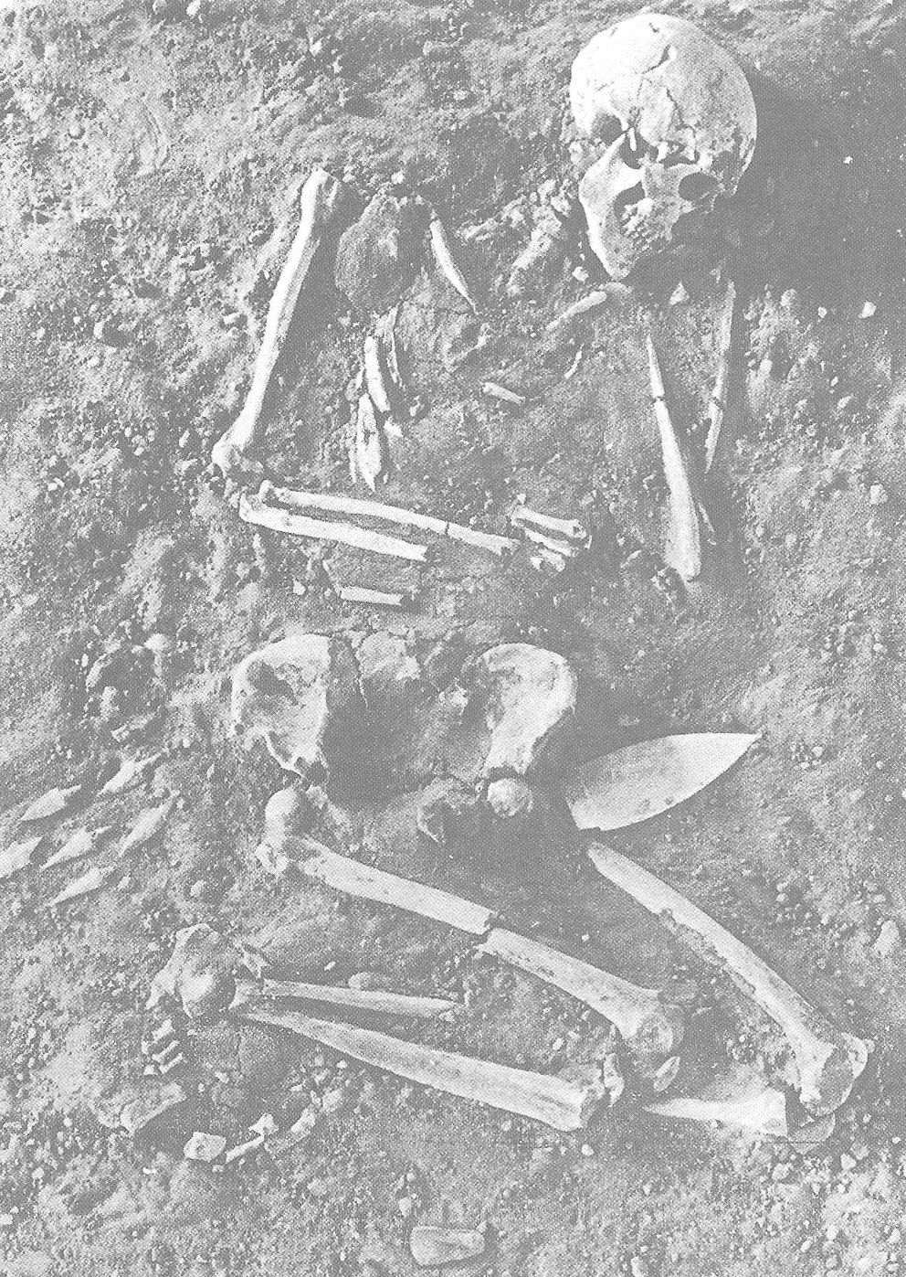 Sepoltura dell'epoca neolitica, attribuita alla cultura del Vaso a Bocca Quadrata, ritrovata a Fumane (provincia di Verona) in località Isola nel greto del torrente.